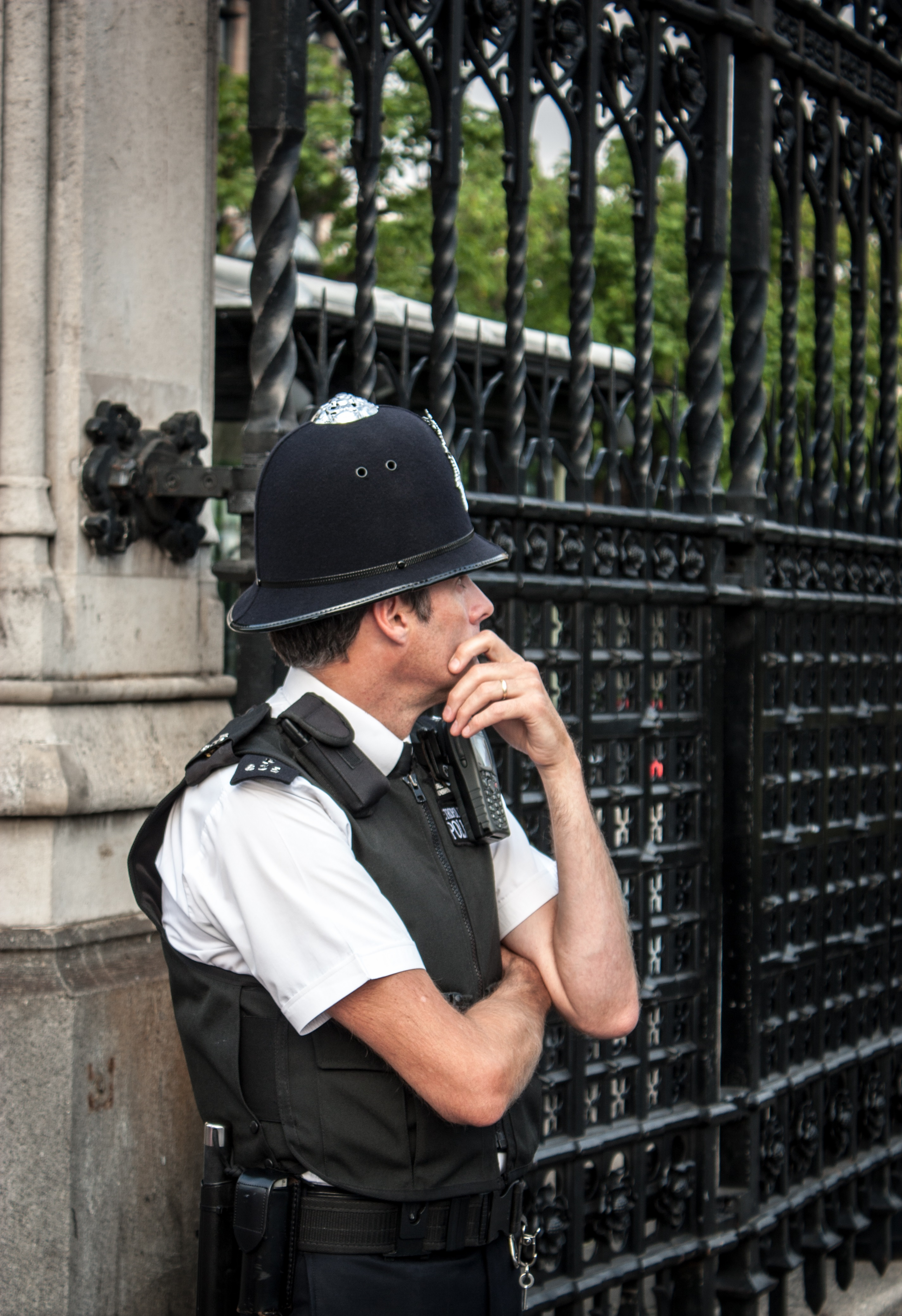 Westminster Bobby